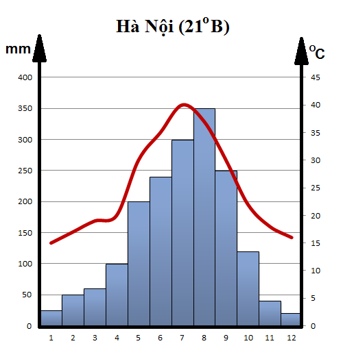 Biểu đồ Nhiệt độ, lượng mưa ở Hà Nội.